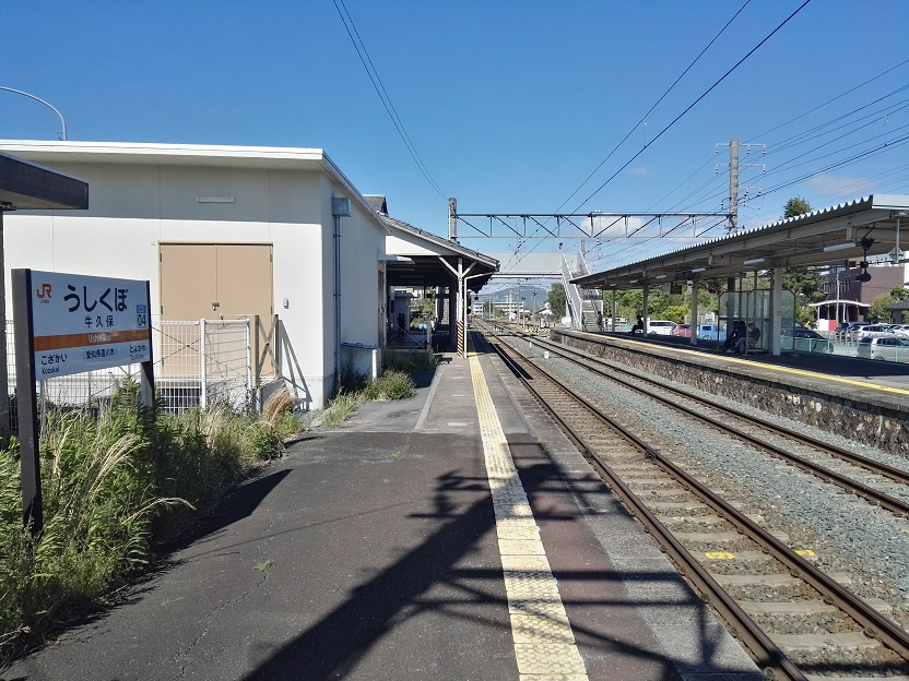 Ushikubo station platform